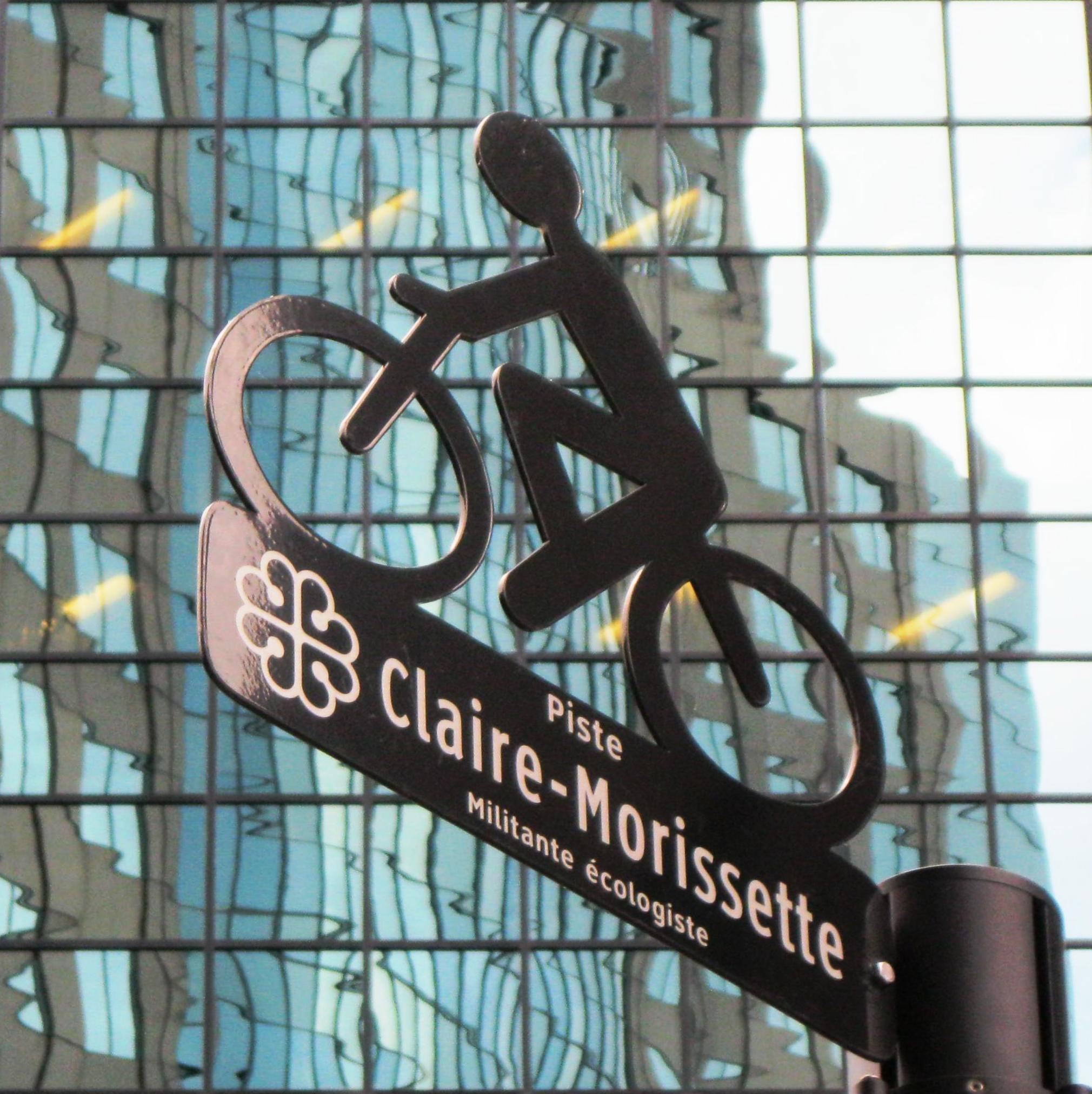 Panneau de signalisation de la piste Claire-Morissette, boulevard De Maisonneuve, Montréal